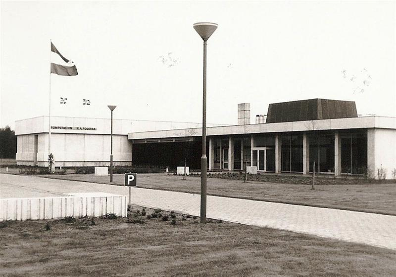 Het pompstation Ir. A. Polstra tijdens de opening op 12 mei 1972